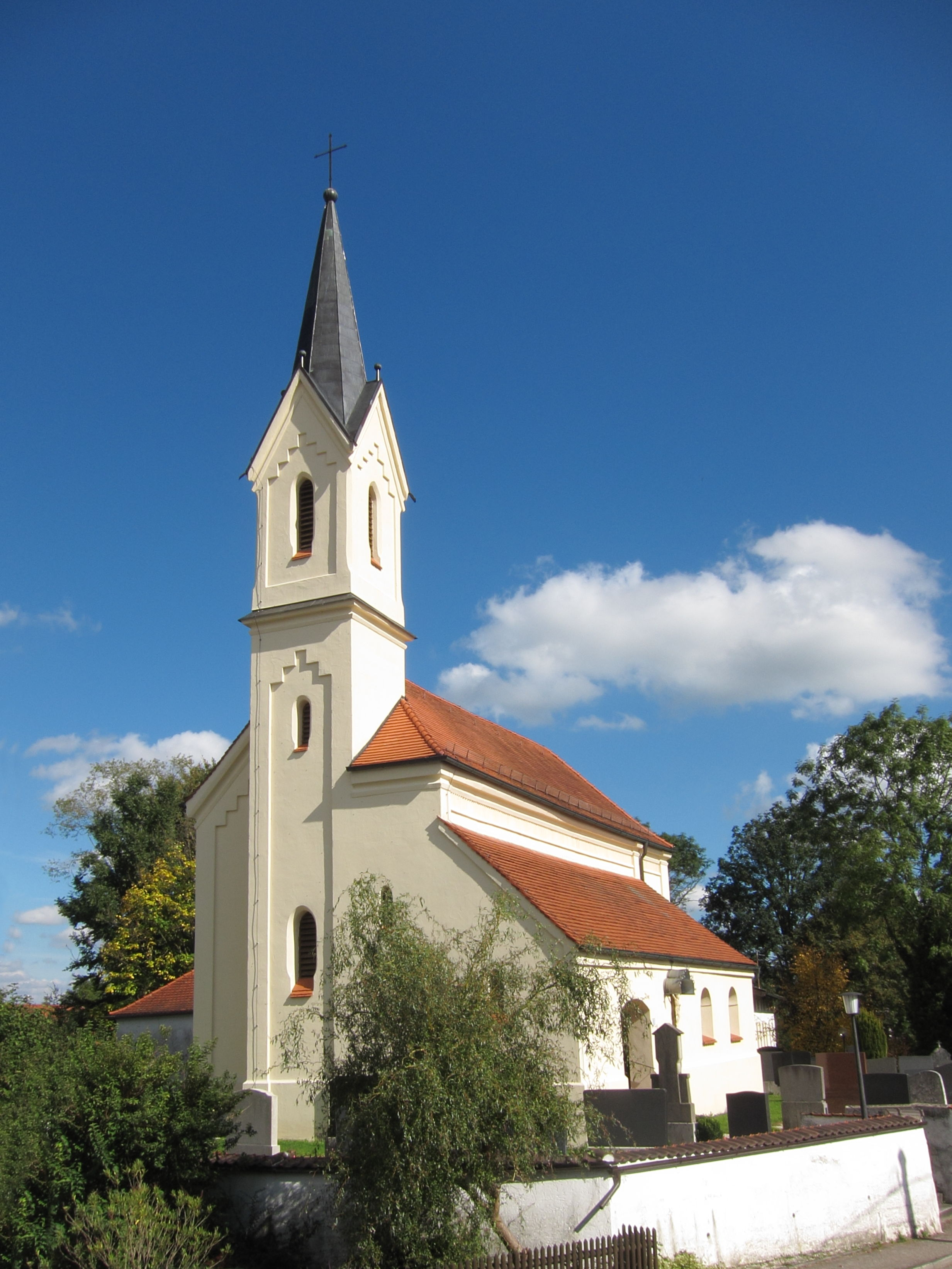 Kath. Filialkirche St. Ulrich, Saalbau mit seitenschiffartigem Anbau und leicht eingezogenem polygonal schließendem Chor, angefügter Sakristei und Westturm, romanisches Langhaus 12./13. Jh., spätgotischer Chor von 1480, Turm neugotisch; mit Ausstattung.